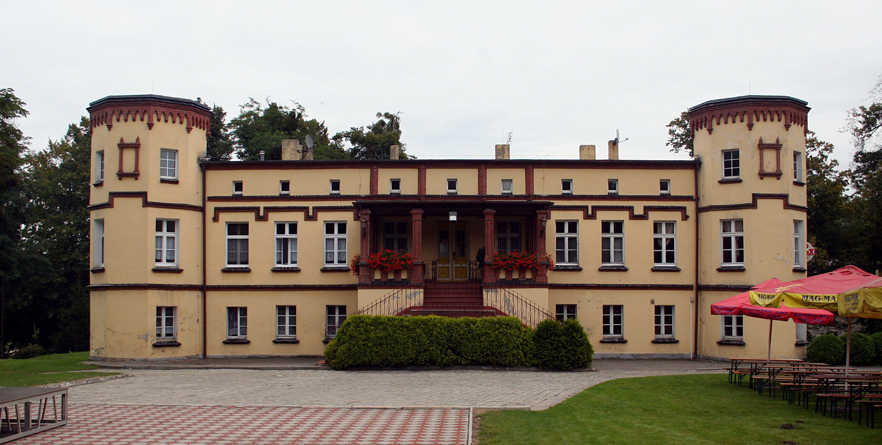 Pałacyk w Czernicy, gmina Gaszowice, powiat rybnicki